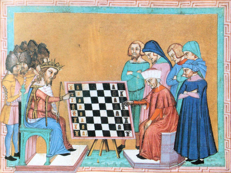 Les Loucos. Miniature de l'ouvrage de Jacques de Cessoles (Liber de moribus, XIVe siècle) (Iluminura presente no Liber de moribus)